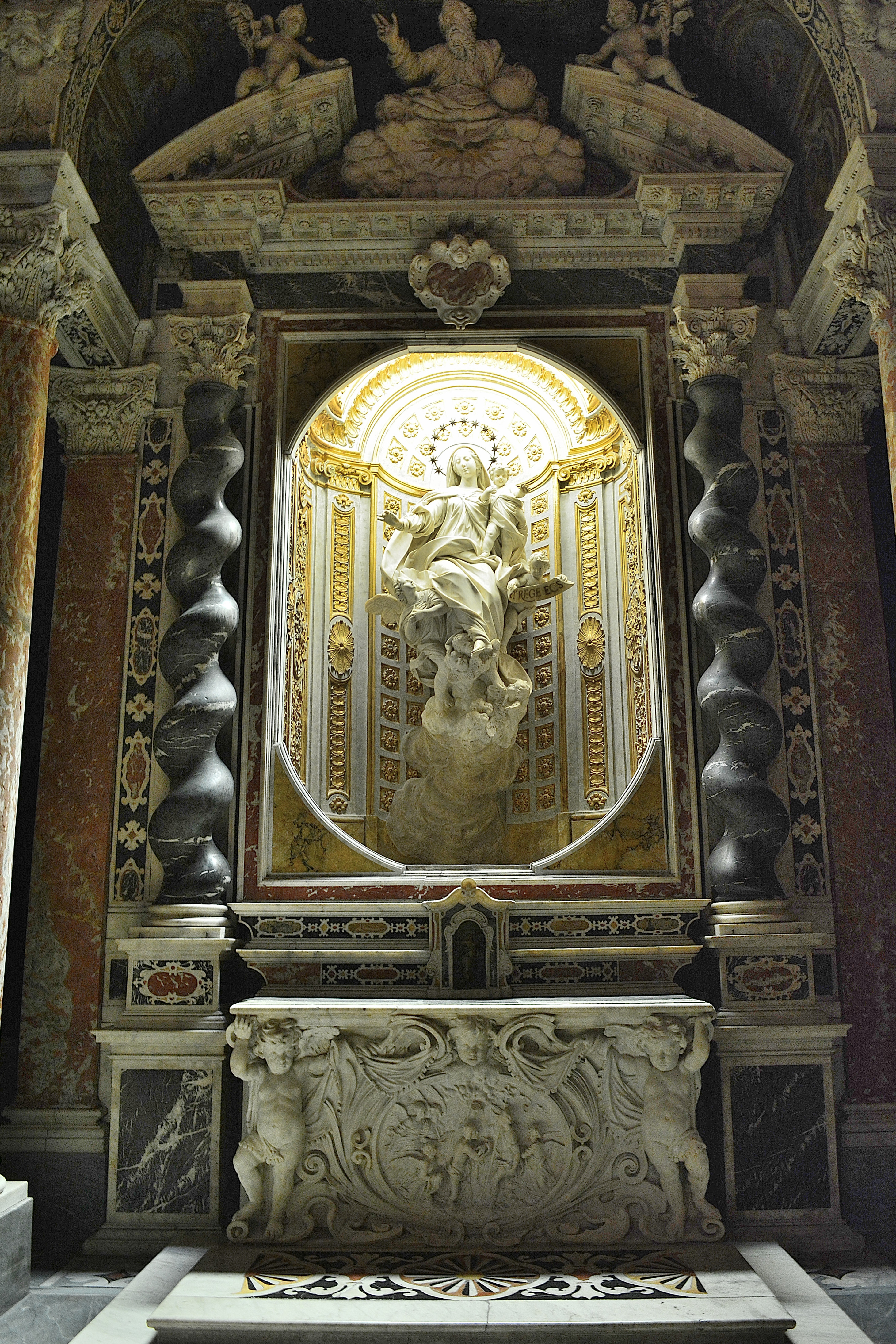 Palazzo Ducale di Genova This is a photo of a monument which is part of cultural heritage of Italy.